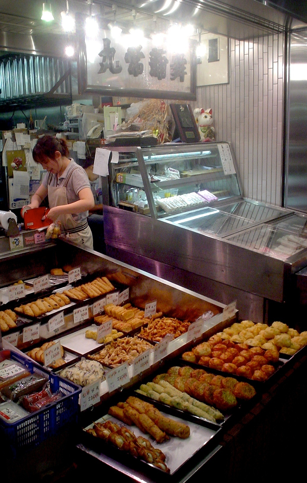 蒲鉾の店（京都市中京区錦小路通柳馬場東入東魚屋町166、手造り蒲鉾専門店「丸常蒲鉾店」[1]）